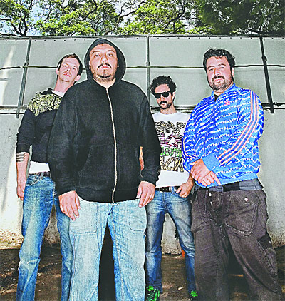 los cuatro molotov